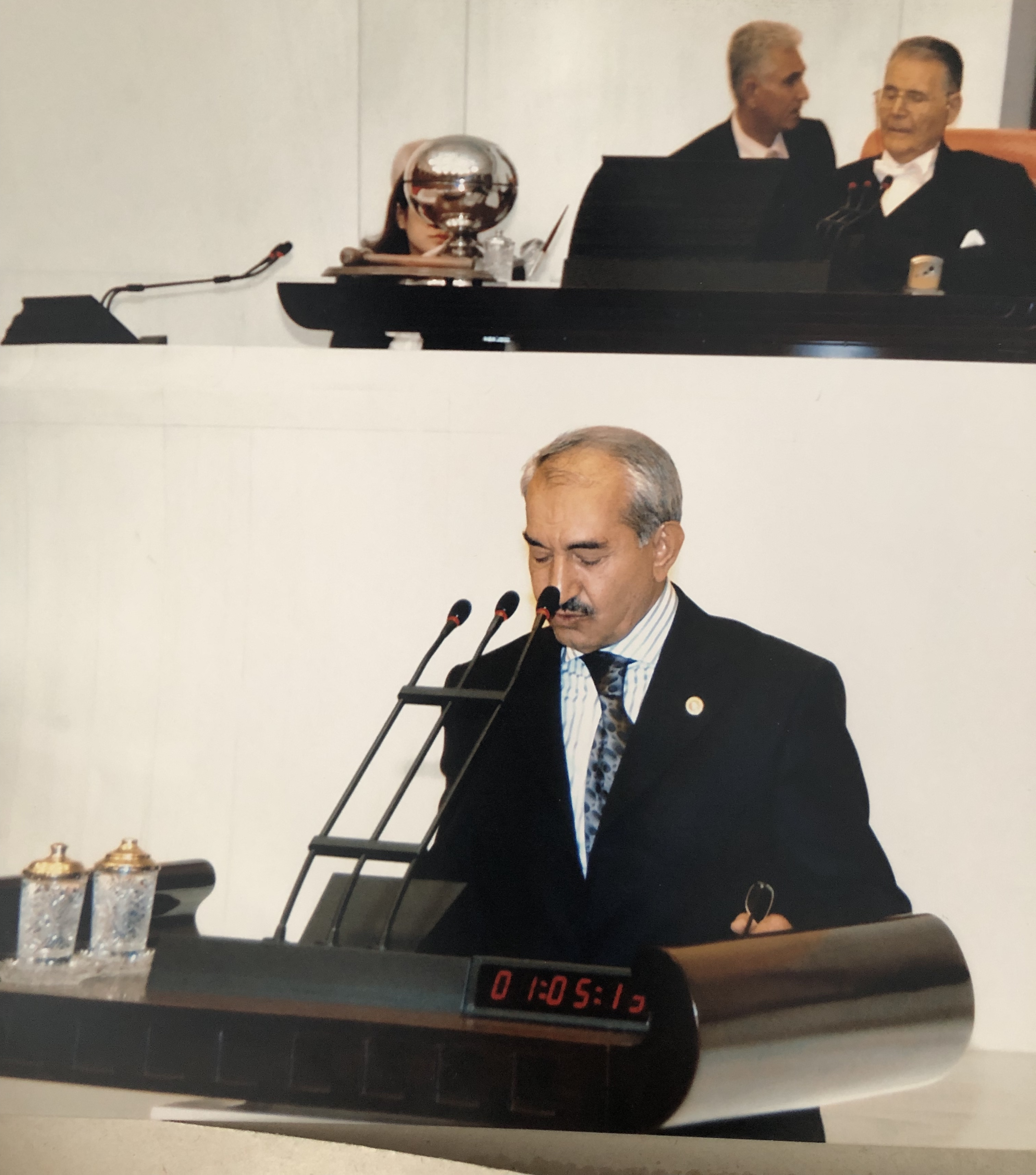 23. Dönem Kahramanmaraş Milletvekili Dr. Cafer TATLIBAL